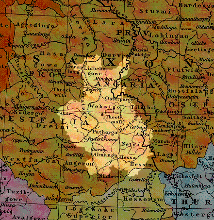 Ostwestfalen im Heiligen Römisches Reich um 1000, Herzogtum Sachsen